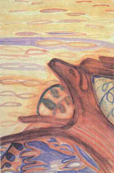 "Olenenok" (Little Deer) by Elena Guro